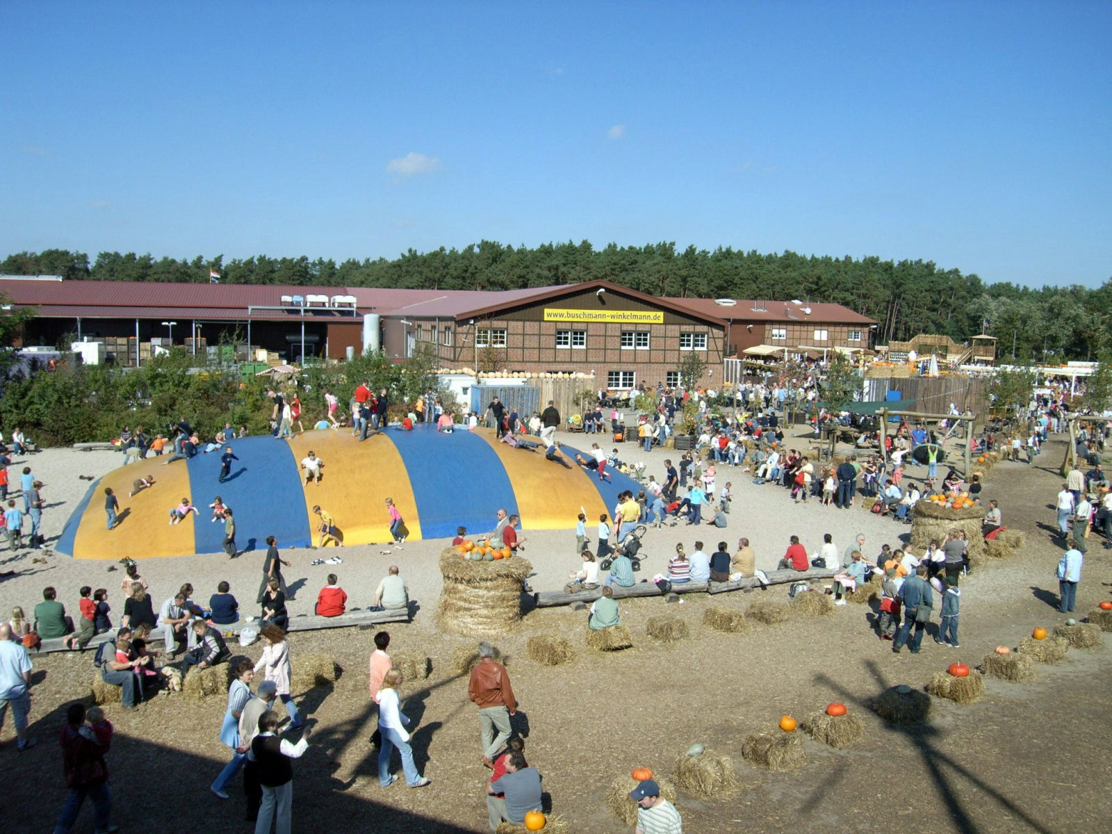 Klaistow,Spargel- und Erlebnishof(Kürbisausstellung)